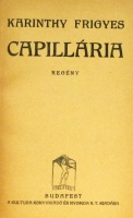 A Capillária című regény első kiadásának címlapja.